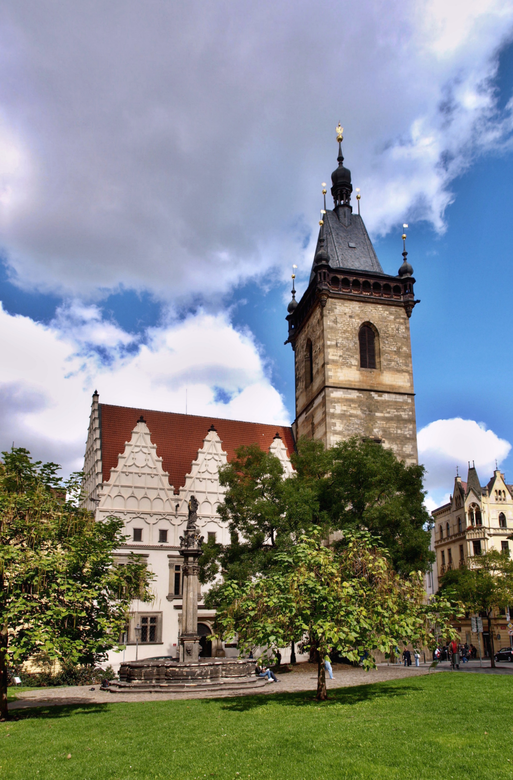 Novoměstská radnice